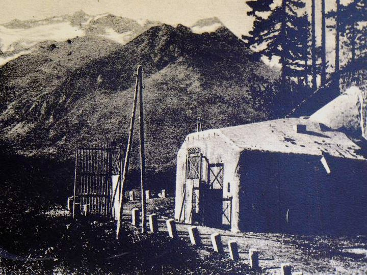 Tagliata stadale Forte Strino